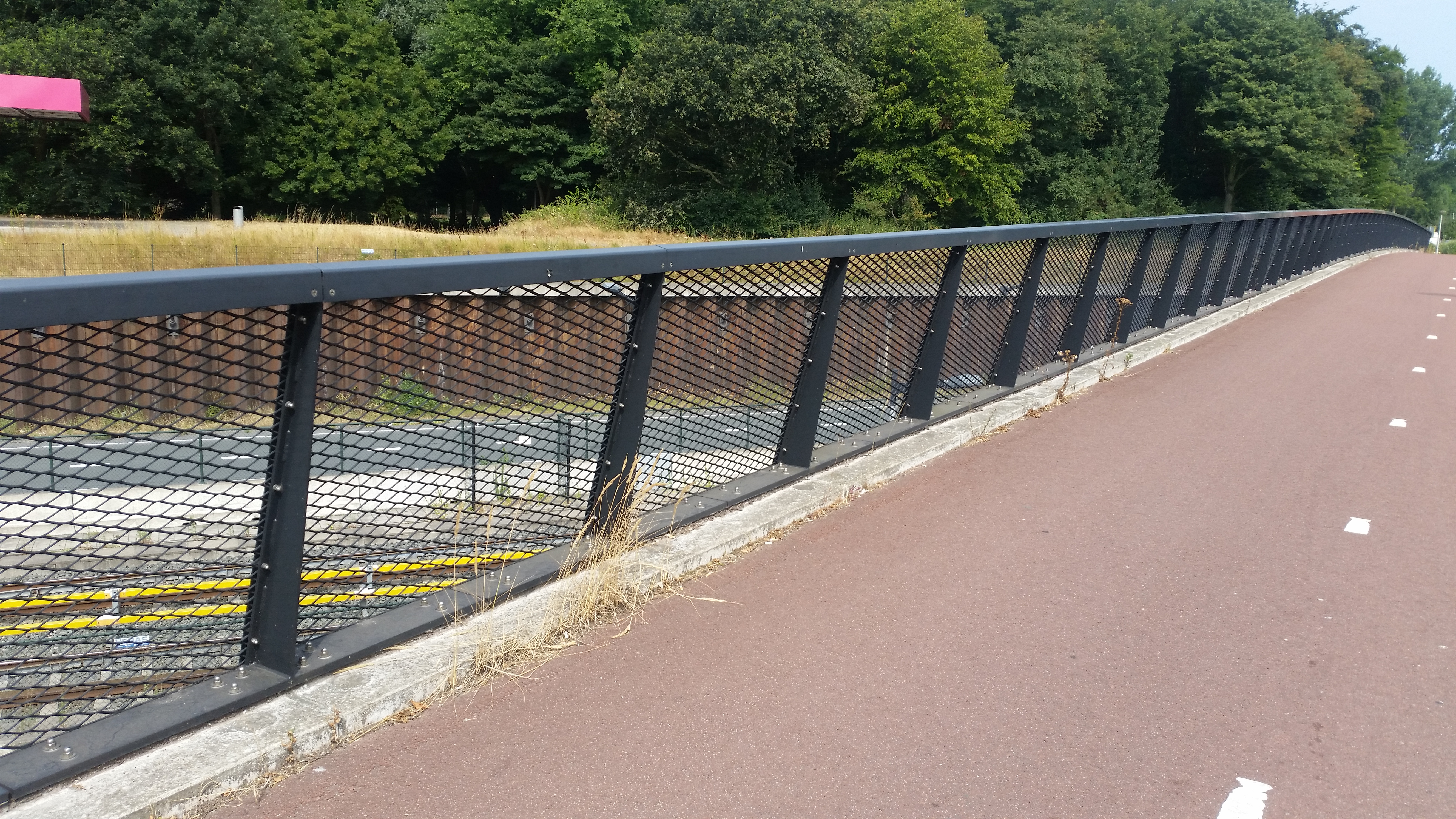 Impressie van Brug 1000 in Amsterdam-Noord (juli 2018)